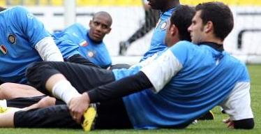 Thiago Motta si riscalda prima di CSKA Mosca-Inter